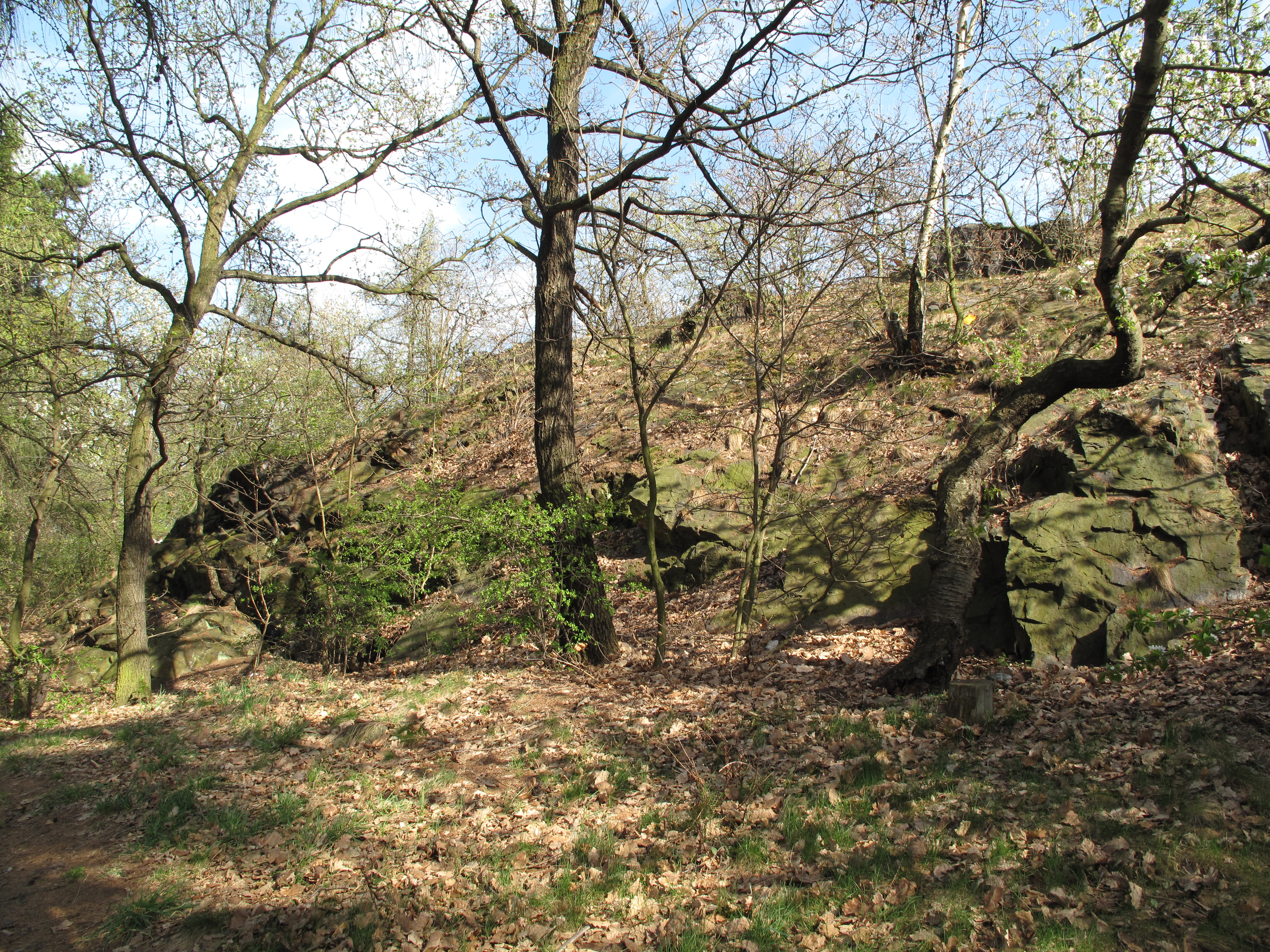 Přírodní památka Velká skála